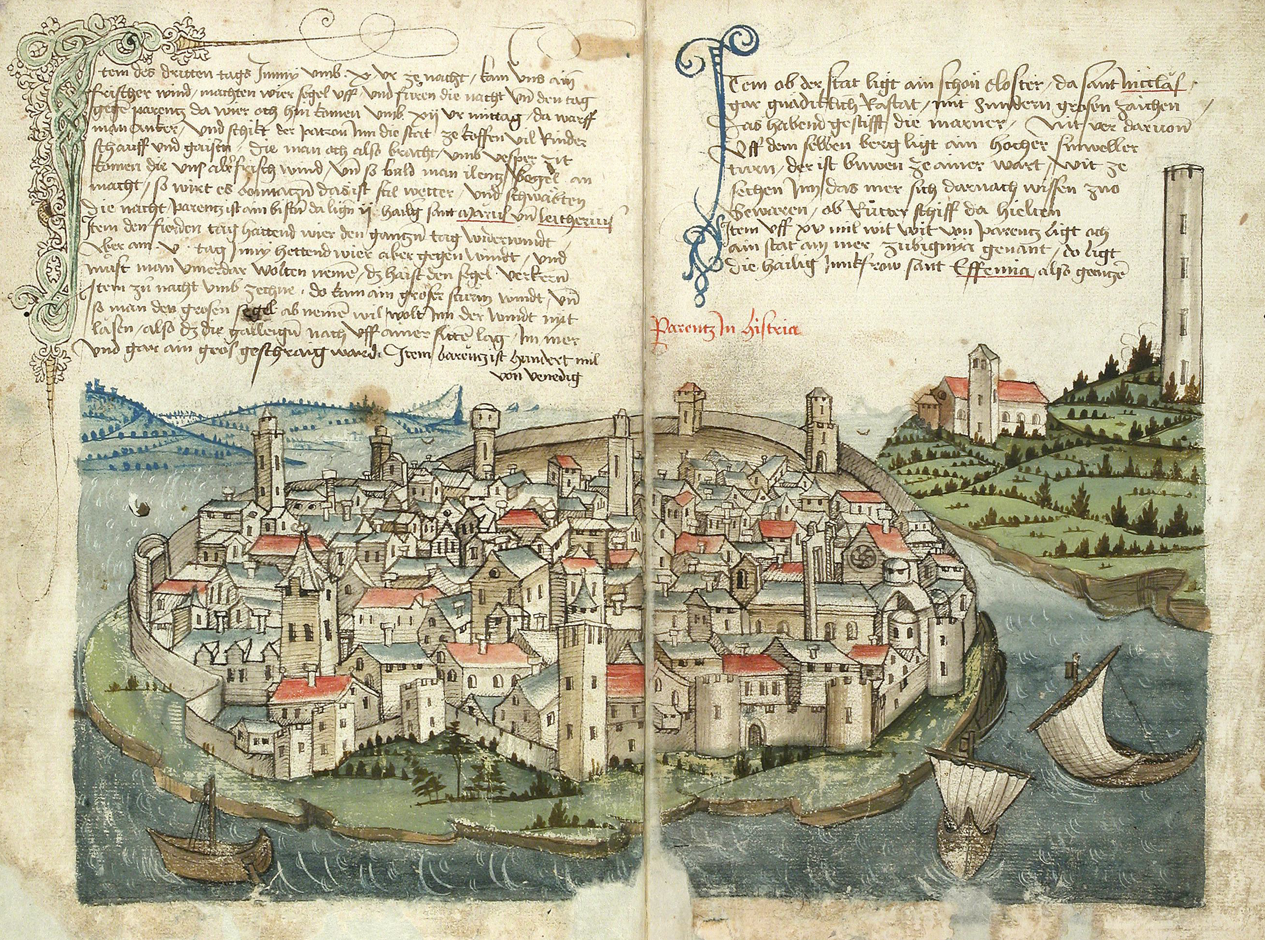 Doppelseite, aus Conrad Grünenberg: Beschreibung der Reise von Konstanz nach Jerusalem. Bodenseegebiet, um 1487. Badische Landesbibliothek Karlsruhe, Cod. St. Peter, pap. 32.